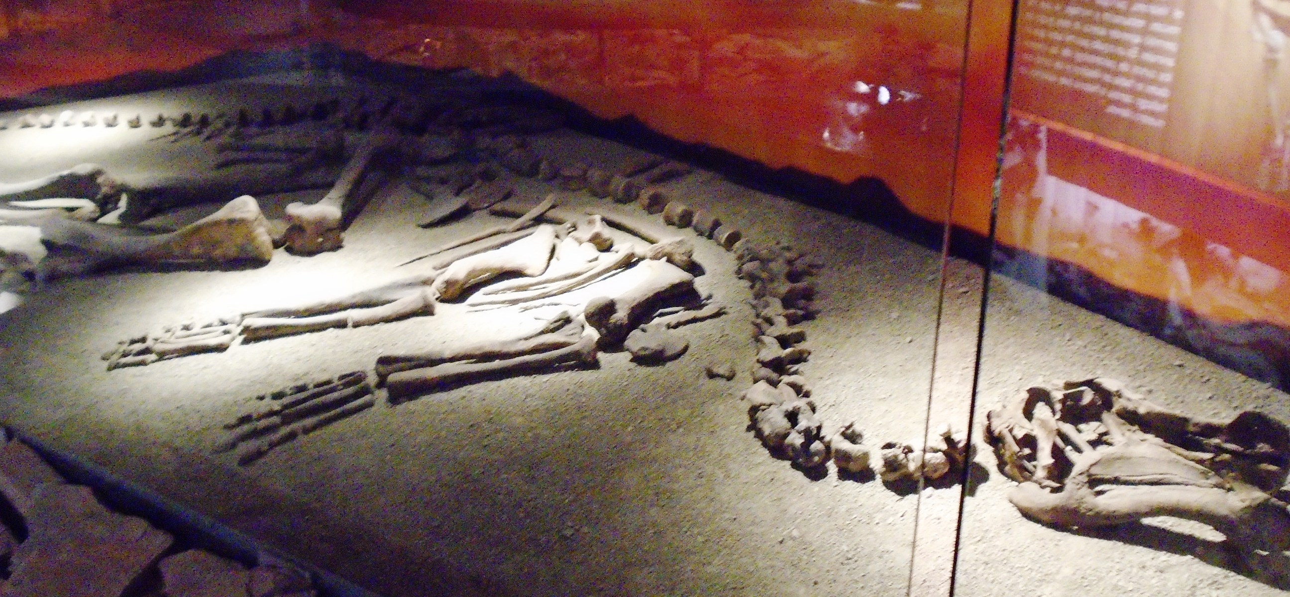 Fósiles originales del Velafrons coahuilensis, exhibidos en el Museo del Desierto.